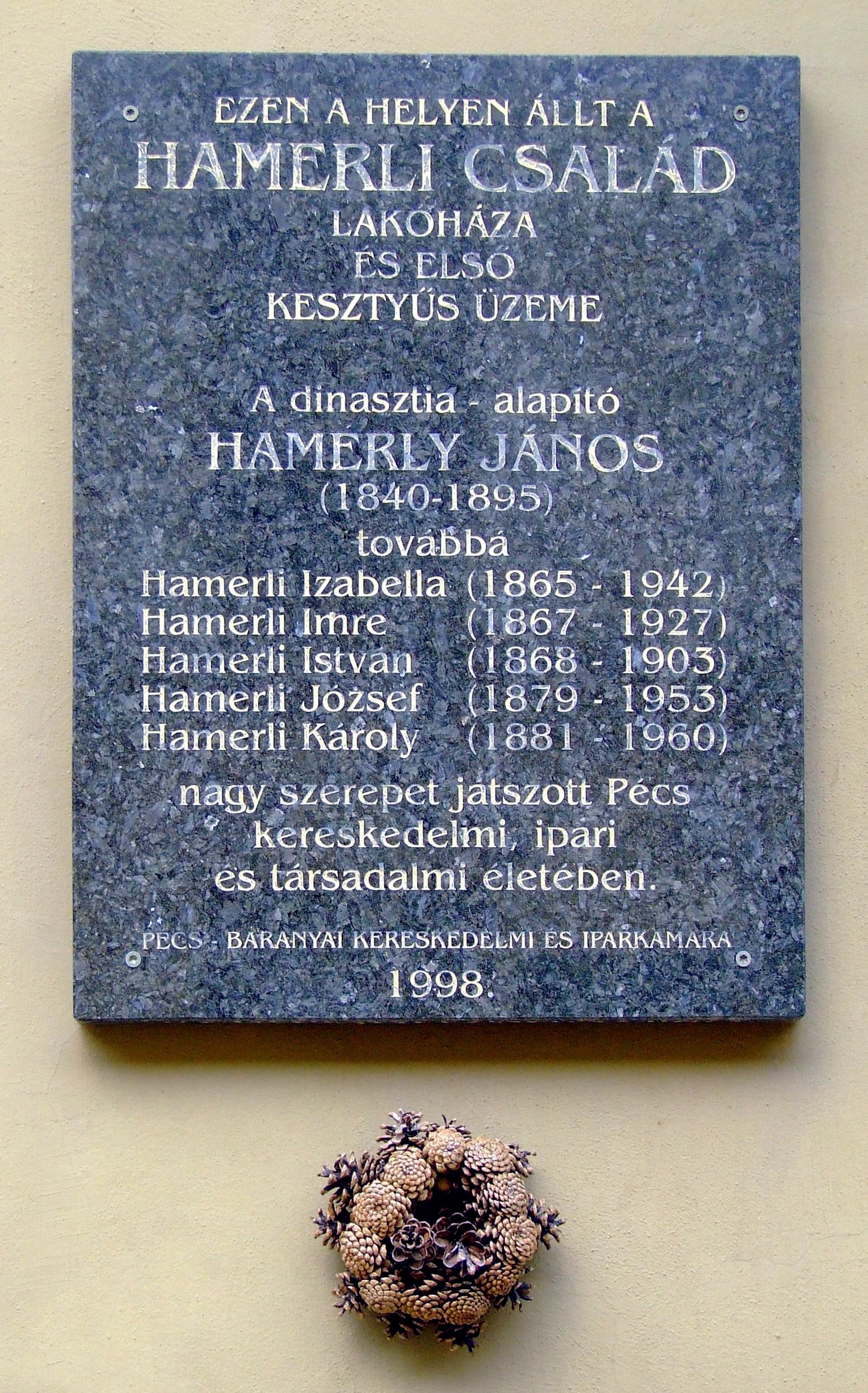 A Hamerli család emléktáblája a pécsi Palatinus szálló falán